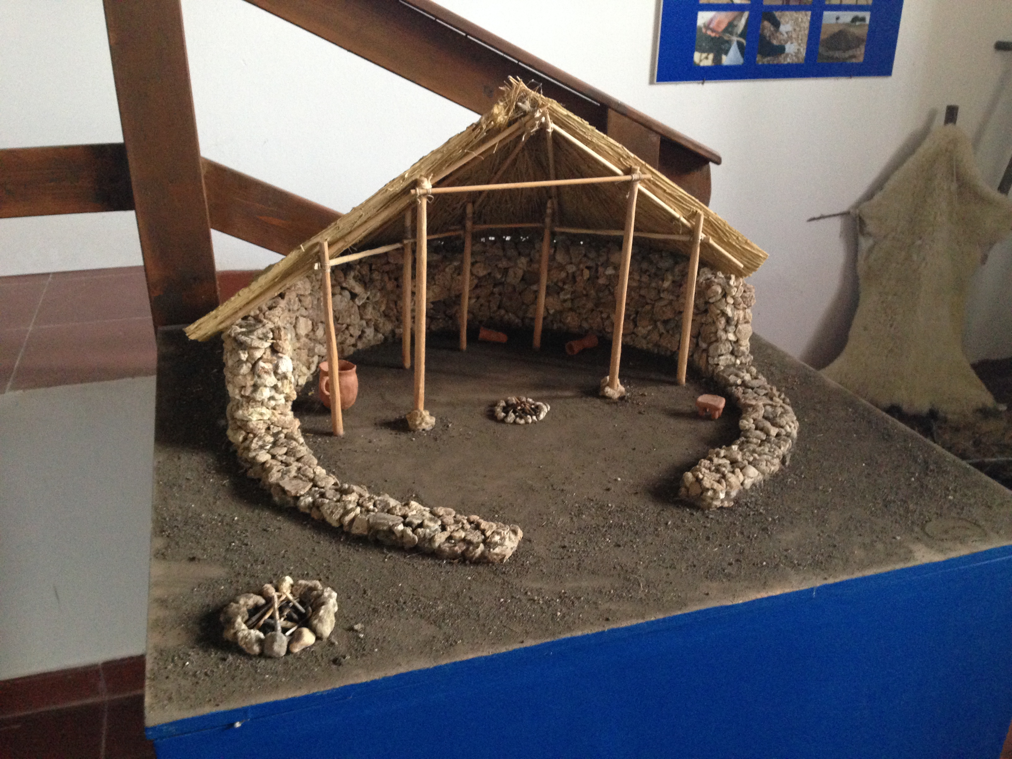 Ricostruzione capanna Thapsos